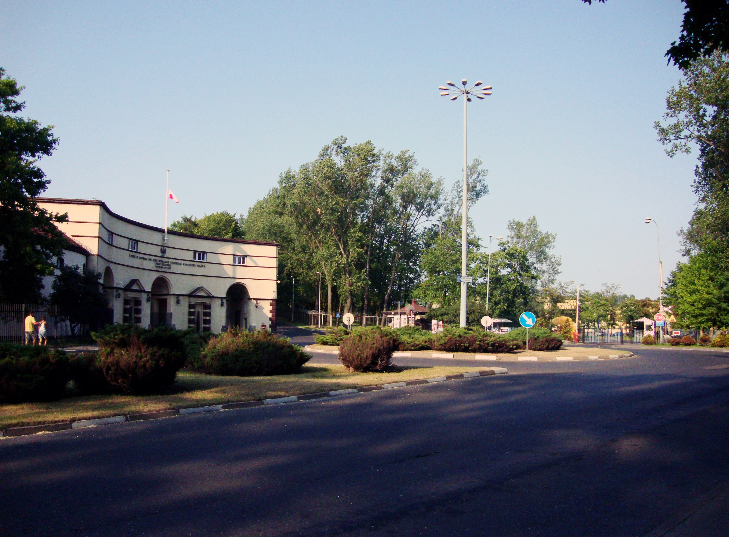 Pętla autobusowa w gdyńskiej dzielnicy Oksywie.